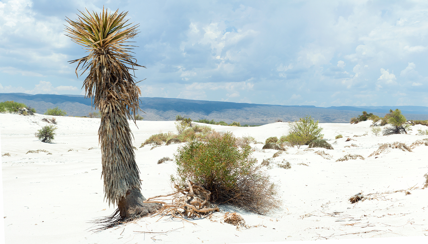 Cuatrocienegas las dunas de yeso